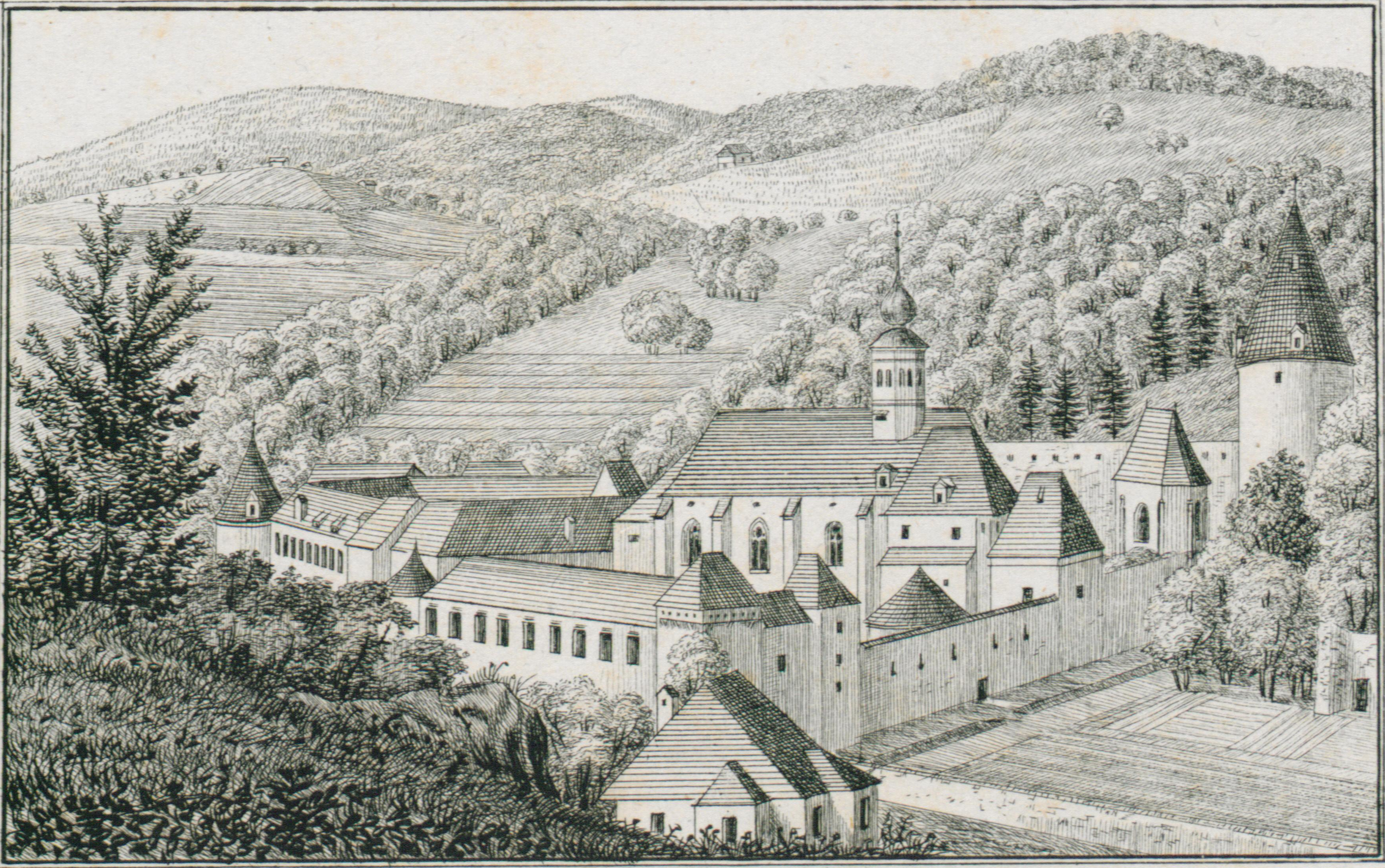 J. F. Kaiser - lithographirte Ansichten der Steyermärkischen Städte, Märkte und Schlösser, Graz 1824-1833